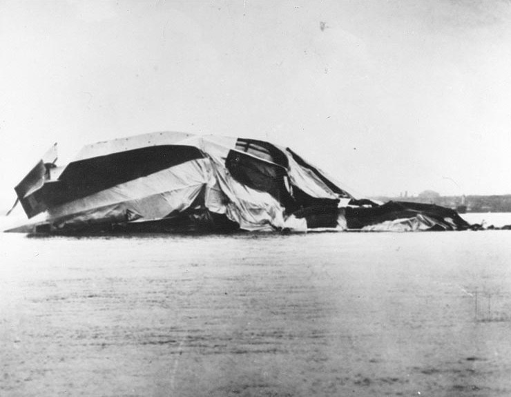 Das Wrack des Luftschiffs R38 im Fluss Humber bei Hull, Yorkshire in England, nachdem es am 24. August 1921 in der Luft auseinandergebrochen, explodiert und abgestürzt war. Das Heck befindet sich im Bild links. Originalbeschreibung: Crash of British airship R-38 (U.S. Navy ZR-2), 24 August 1921 The airship's wreckage in the Humber River at Hull, Yorkshire, England, after it had broken up in the air, exploded and crashed. The tail is at the left. Courtesy of Carl S. Walters, 1970. U.S. Naval Historical Center Photograph.